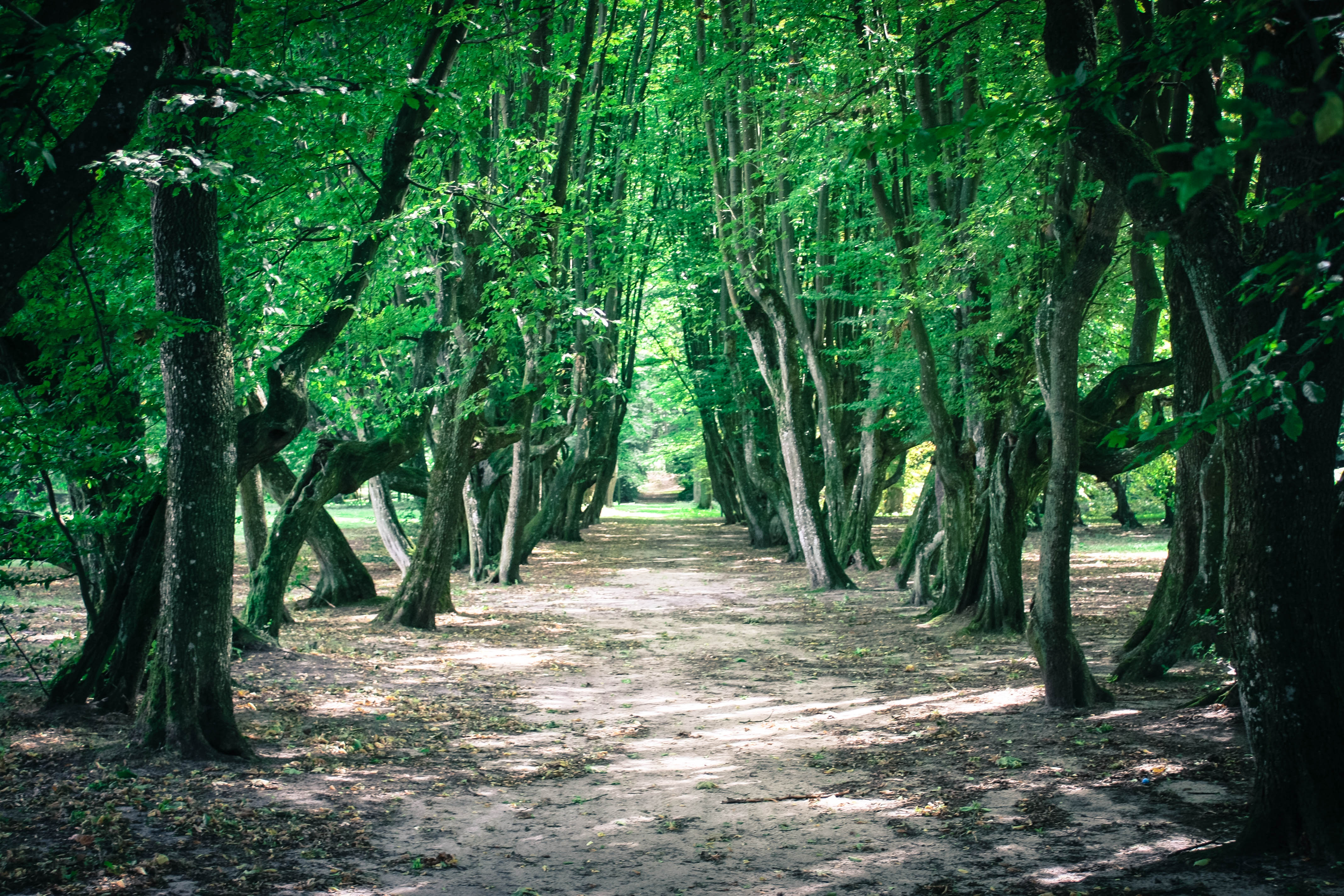 Siemczyno, park, XVIII, 1 poł. XIX, 4 ćw. XIX